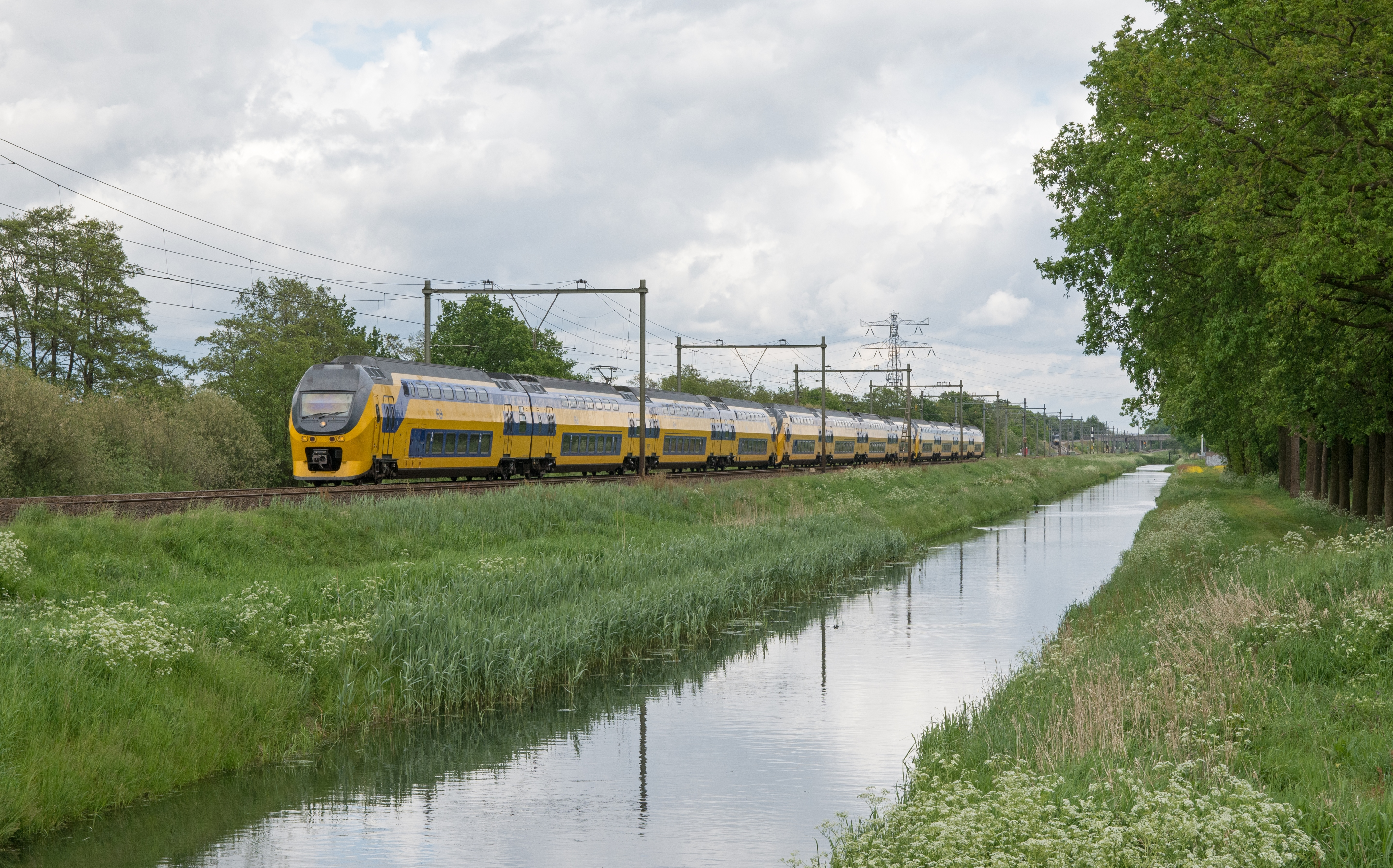 Normaal worden 2 6-delige VIRM gebruikt voor 12 bakken. Maar deze 12 delige dubbeldekker bestond uit 3x IRM 9571-9512-9506. Bij Maarsbergen de Rummelaar onderweg als IC 3048 Den Helder. Het water langs het spoor is de Grift.